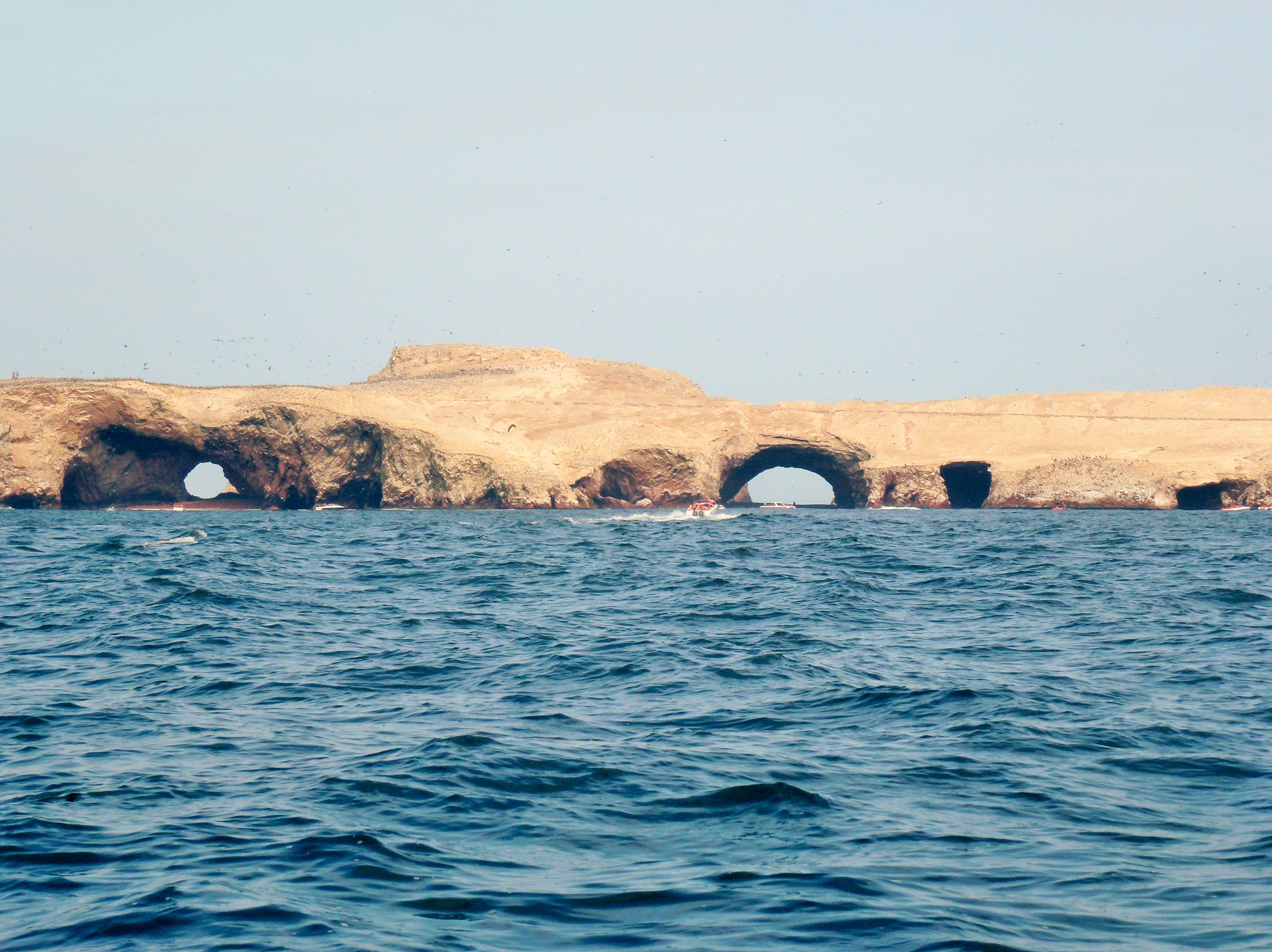 les Îles Ballestas et la Réserve nationale de Paracas Pérou